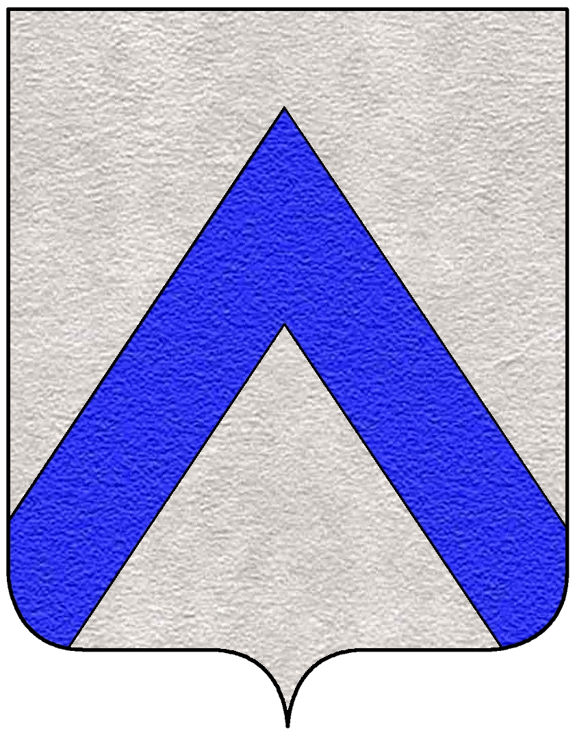 Stemma della famiglia Canali